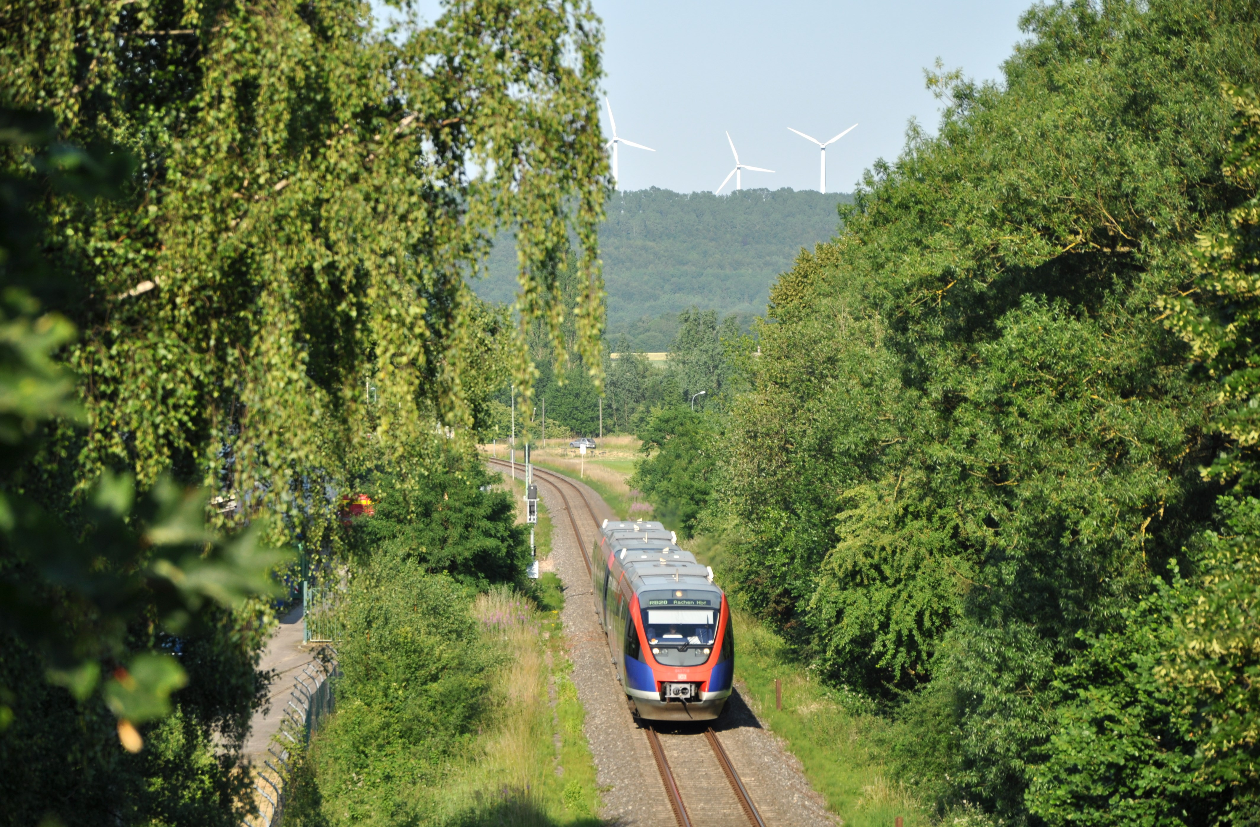 643 218 zwischen Eschweiler-Nothberg und Eschweiler Talbahnhof. Aufgrund von Bauarbeiten auf der südlich gelegenen Hauptstrecke in Doppeltraktion mit einem weiteren Talent-Triebwagen.